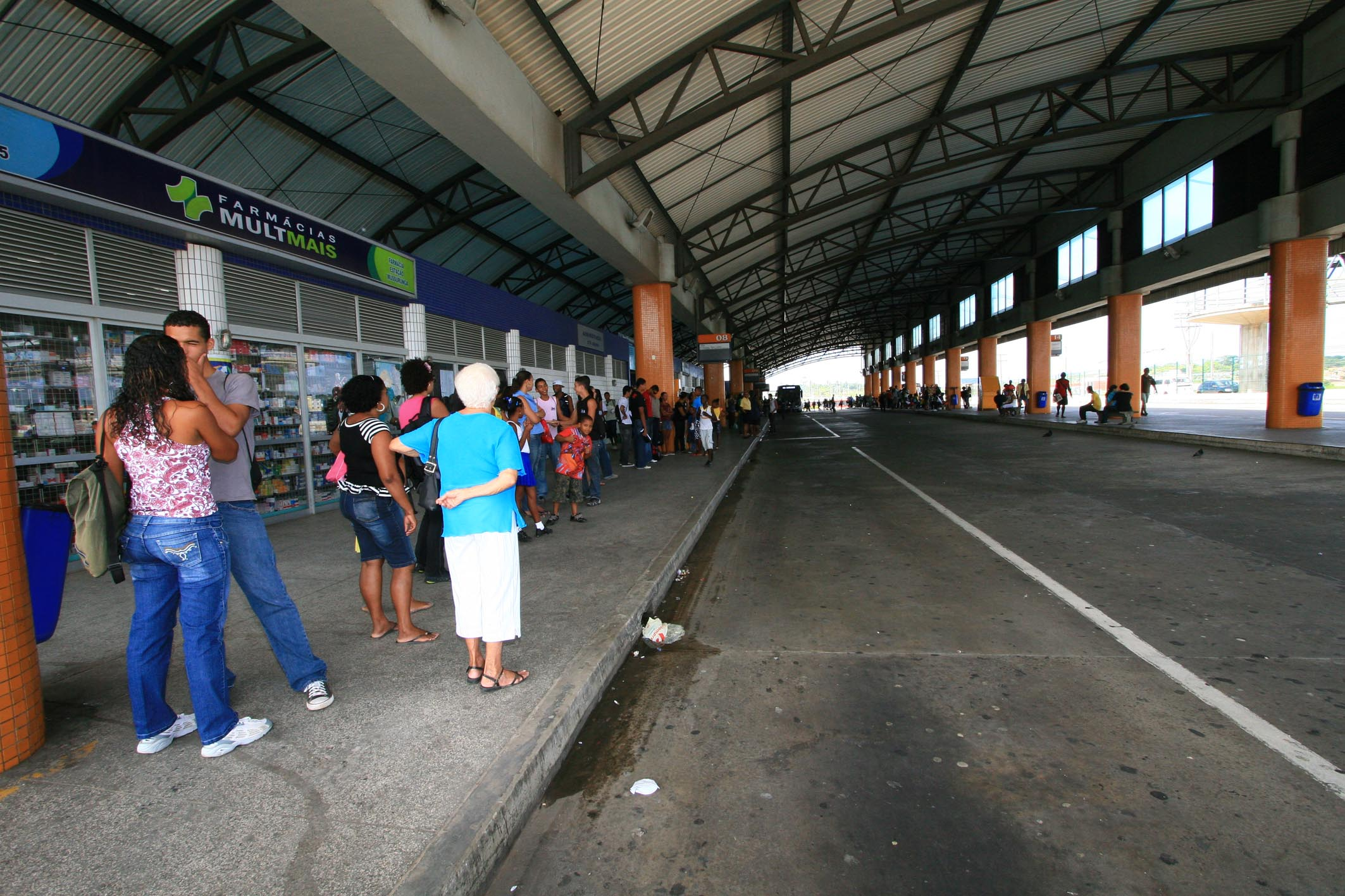 Polícia Militar reforça segurança nos terminais de ônibus da cidade. Foto: Alberto Coutinho / AGECOM